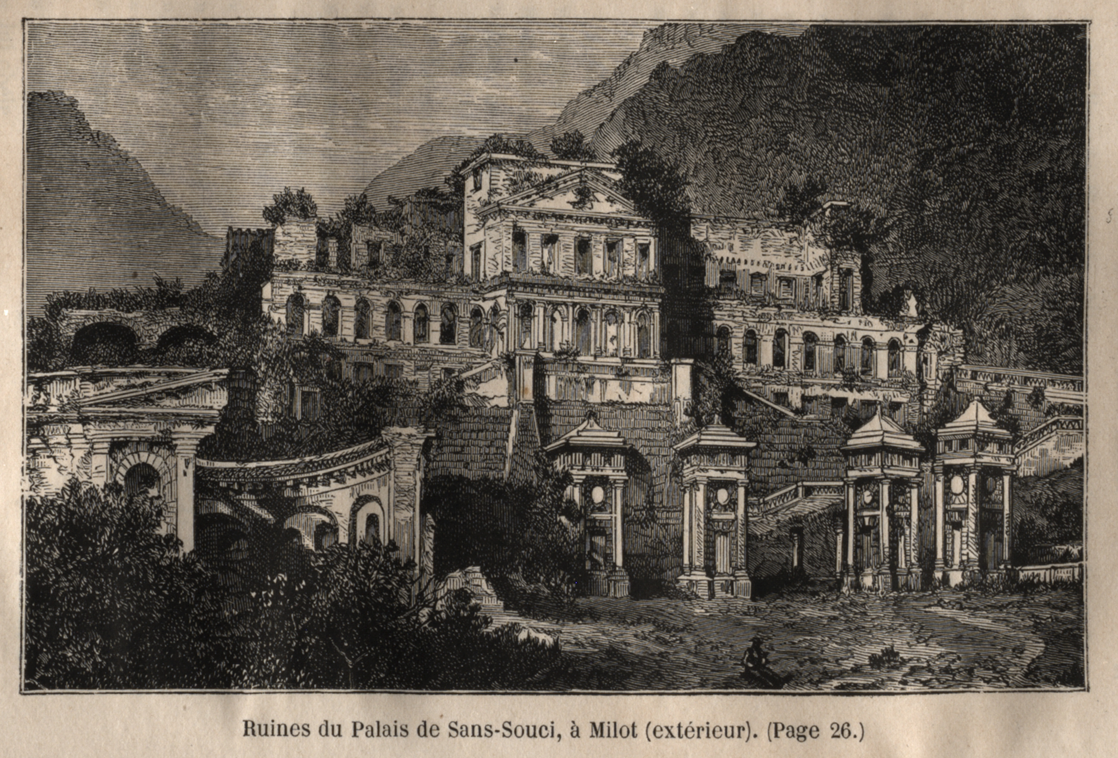 Ruines du Palais de Sans-Souci, à Milot ( extérieur ) Année de publication : 1881